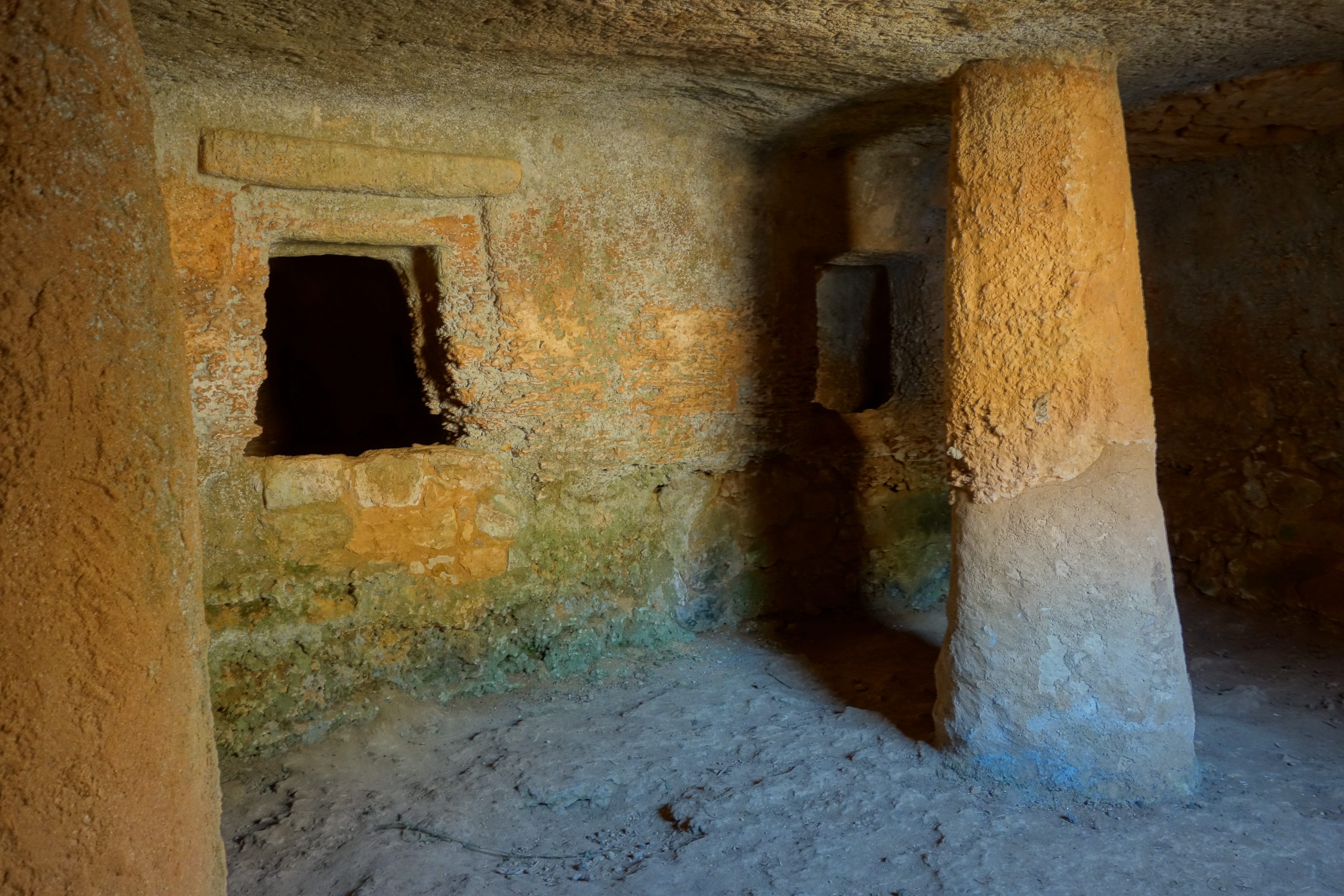 Tomba XX bis, Anghelu Ruju